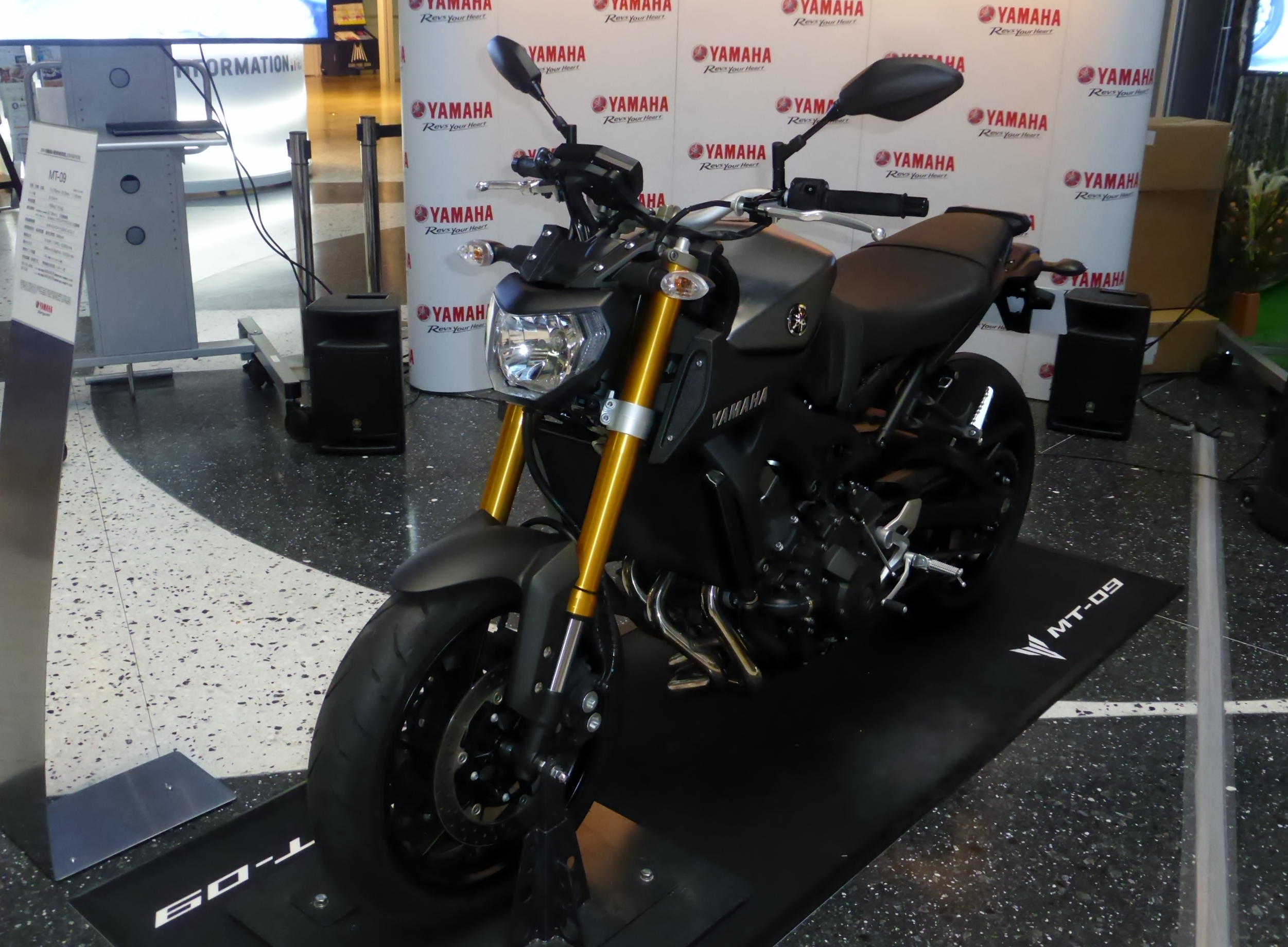 ヤマハ・MT-09を撮影。